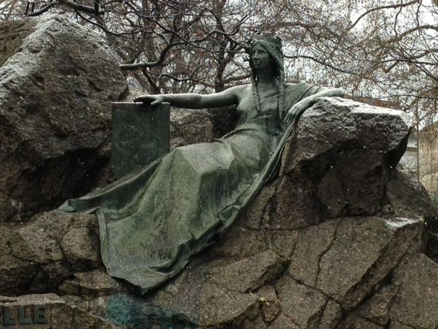 Allégorie représentant Berna (Berne). Monument de l'Union postale universelle, par René de Saint-Marceaux (1909). A Berne, Bundesgasse